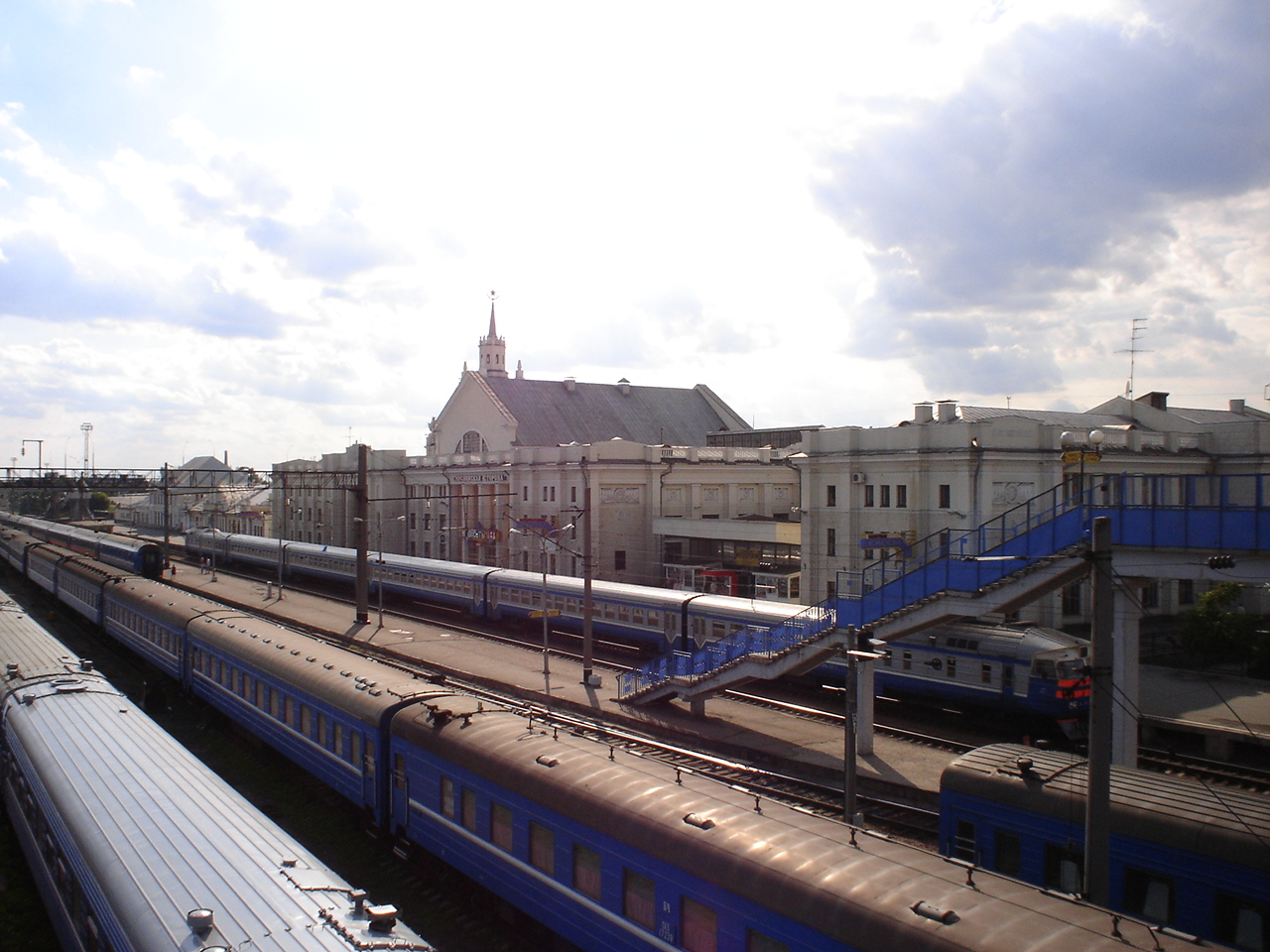 Stacja kolejowa w Brześciu Brest Tsentralny railway station